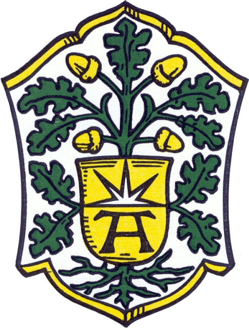 Wappen der Stadt Bad Arolsen Blasonierung „In Silber eine bewurzelte grüne Eiche mit goldenen Eicheln, belegt mit einem goldenen Herzschild, der ein schwarzes A überhöht von einem oberhalben schwarzen Stern zeigt.“[1] Wappen genehmigt am 2. Februar 1938 und erneut am 30. März 1976